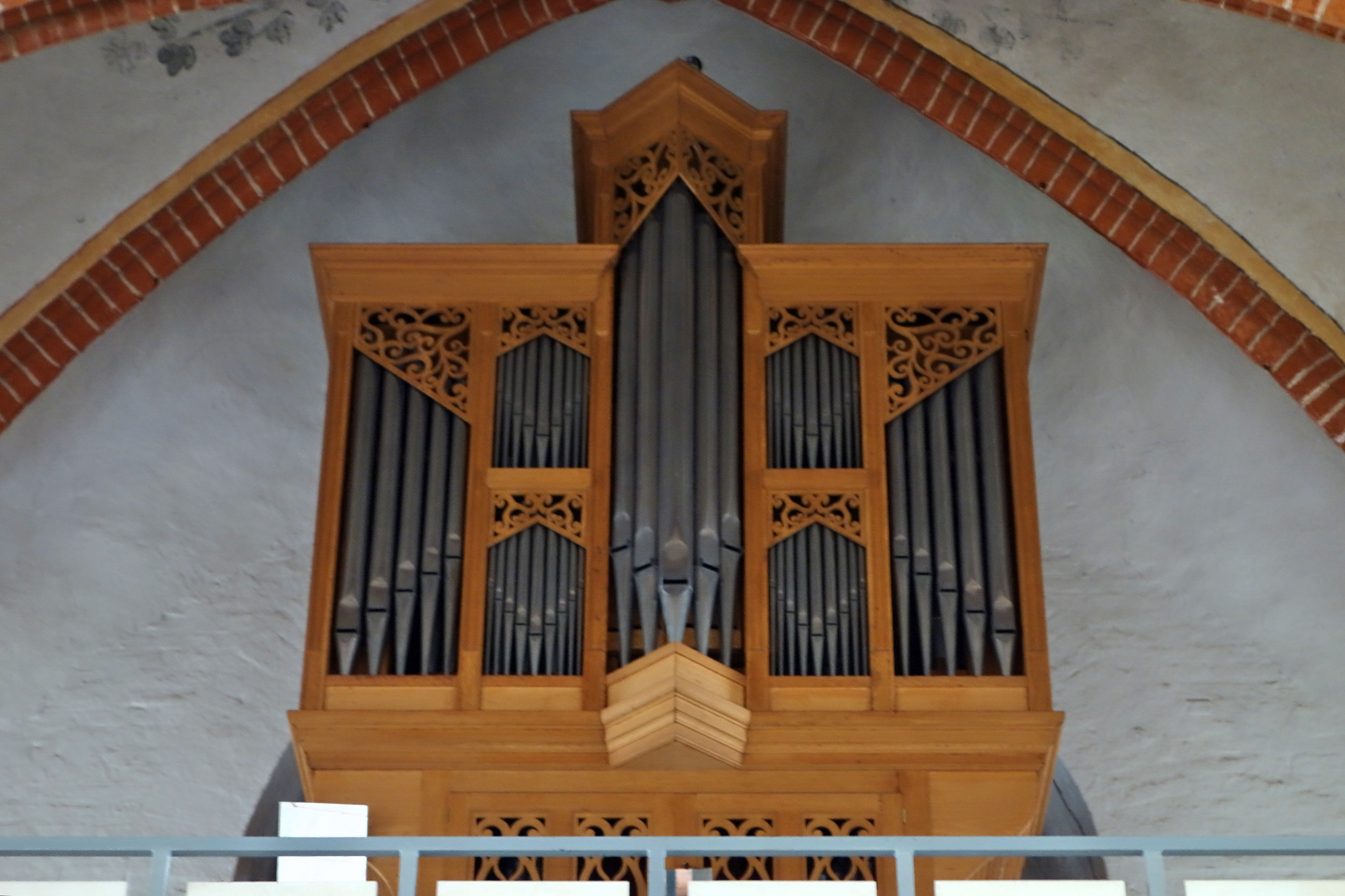 Orgel in St. Johannis, Verden, Niedersachsen